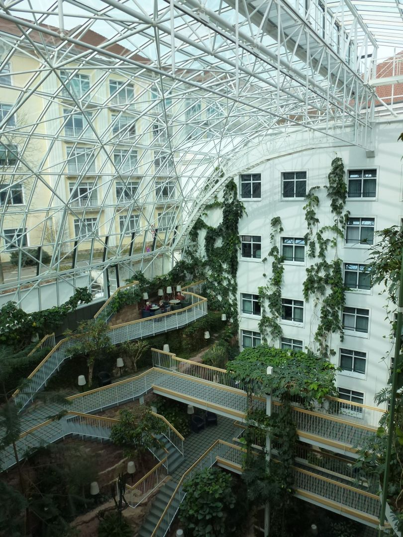 Im Bettenhaus der Zentralklinik